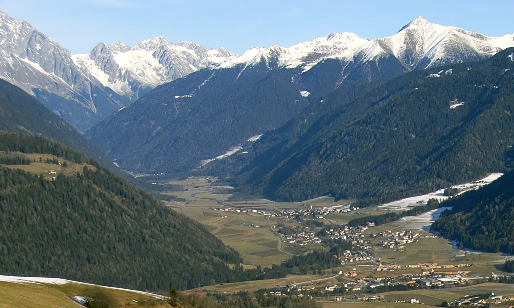 Italien, Südtirol: Blick vom Kronplatz in das Antholzertal. Vorne der Ort Rasen-Antholz. Im Hintergrund von links nach rechts Kleine, Mittlere und Große Ohrenspitze, rechts davor Knobelstein, Ochsenfelder und Amperspitz. Ganz links zudem der Ostgrat des Wildgall.